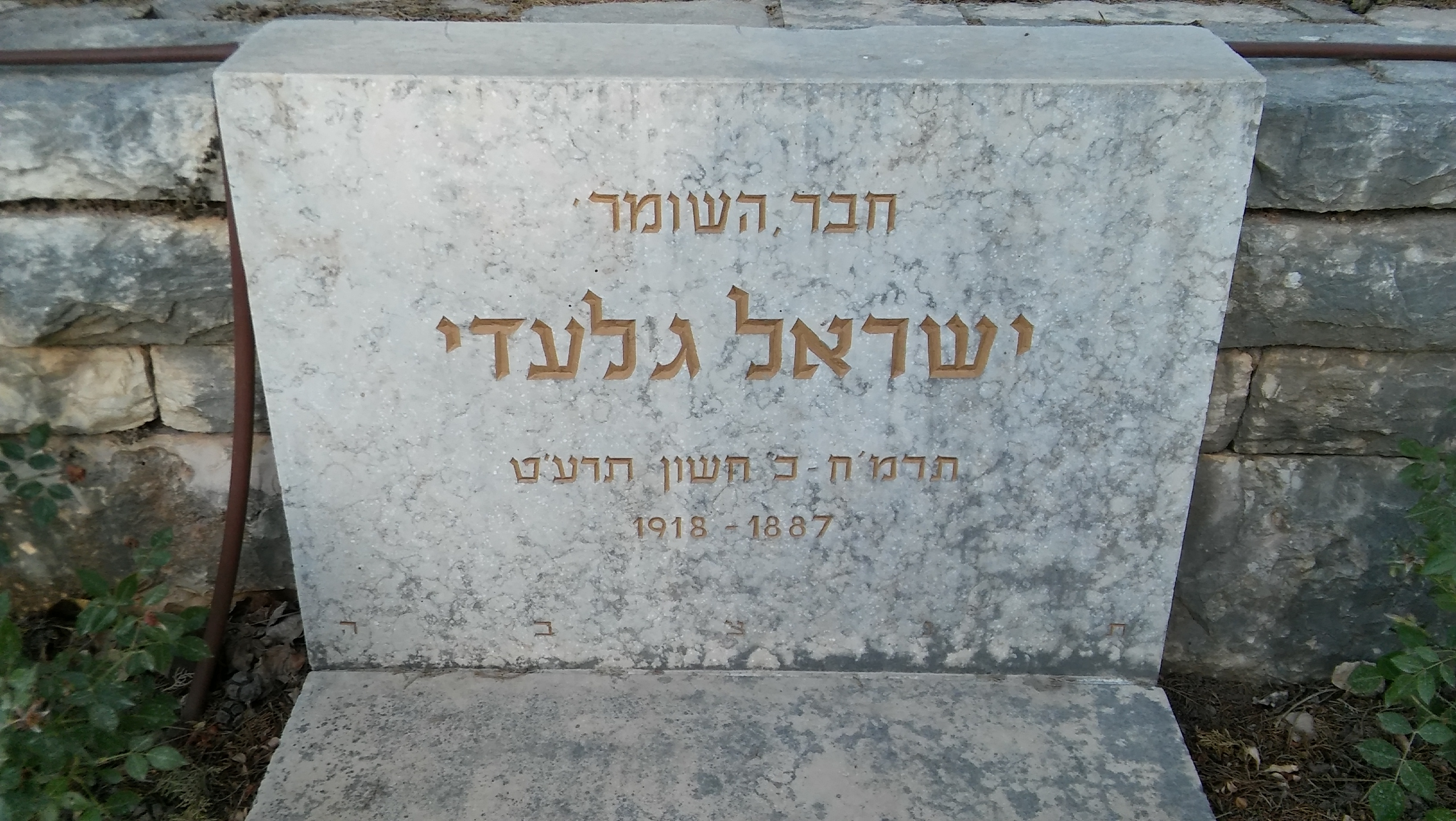 קברו של ישראל גלעדי בחלקת השומר בבית הקברות של כפר גלעדי